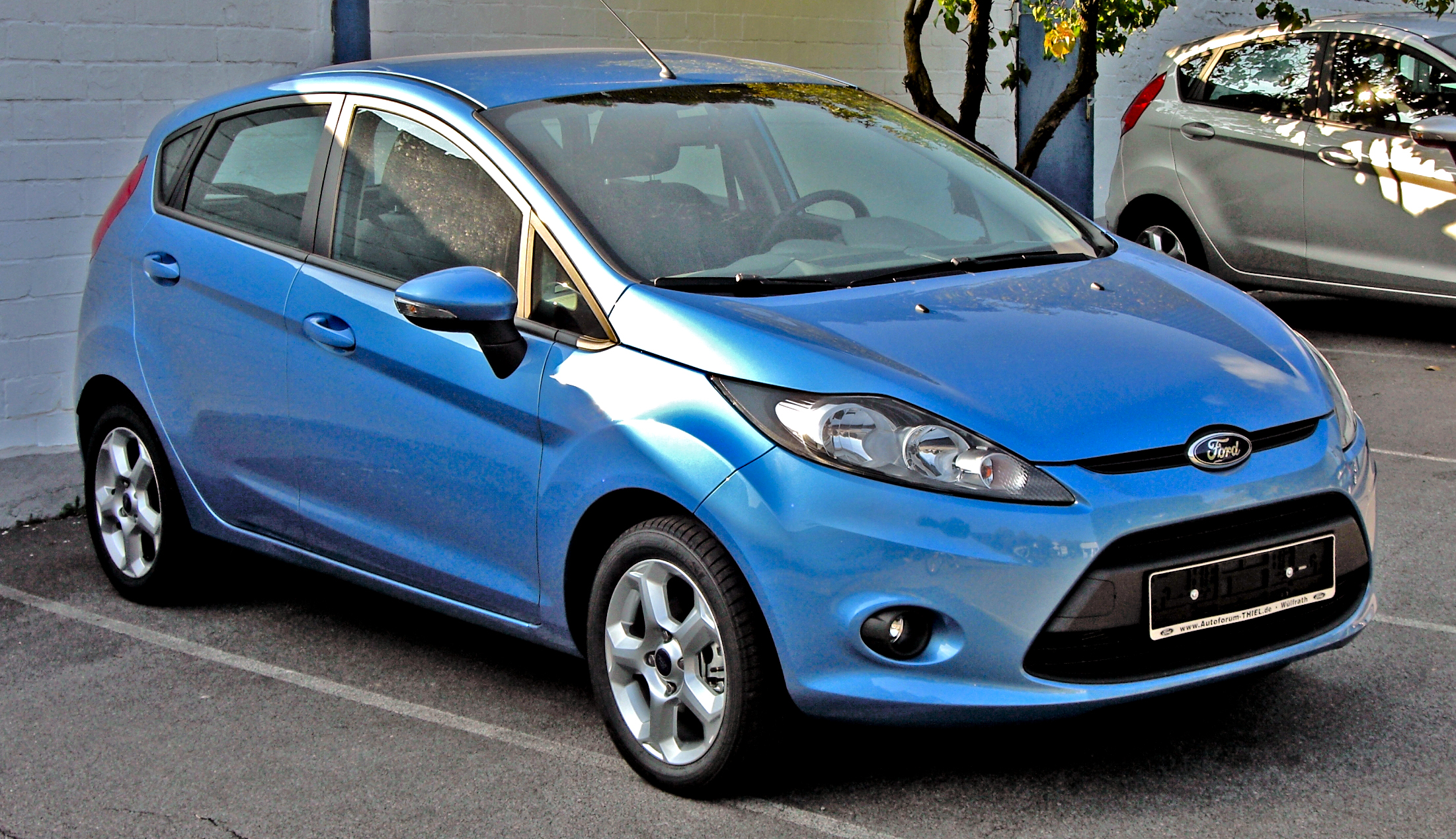 Ford Fiesta MK6 (2008) „Trend“